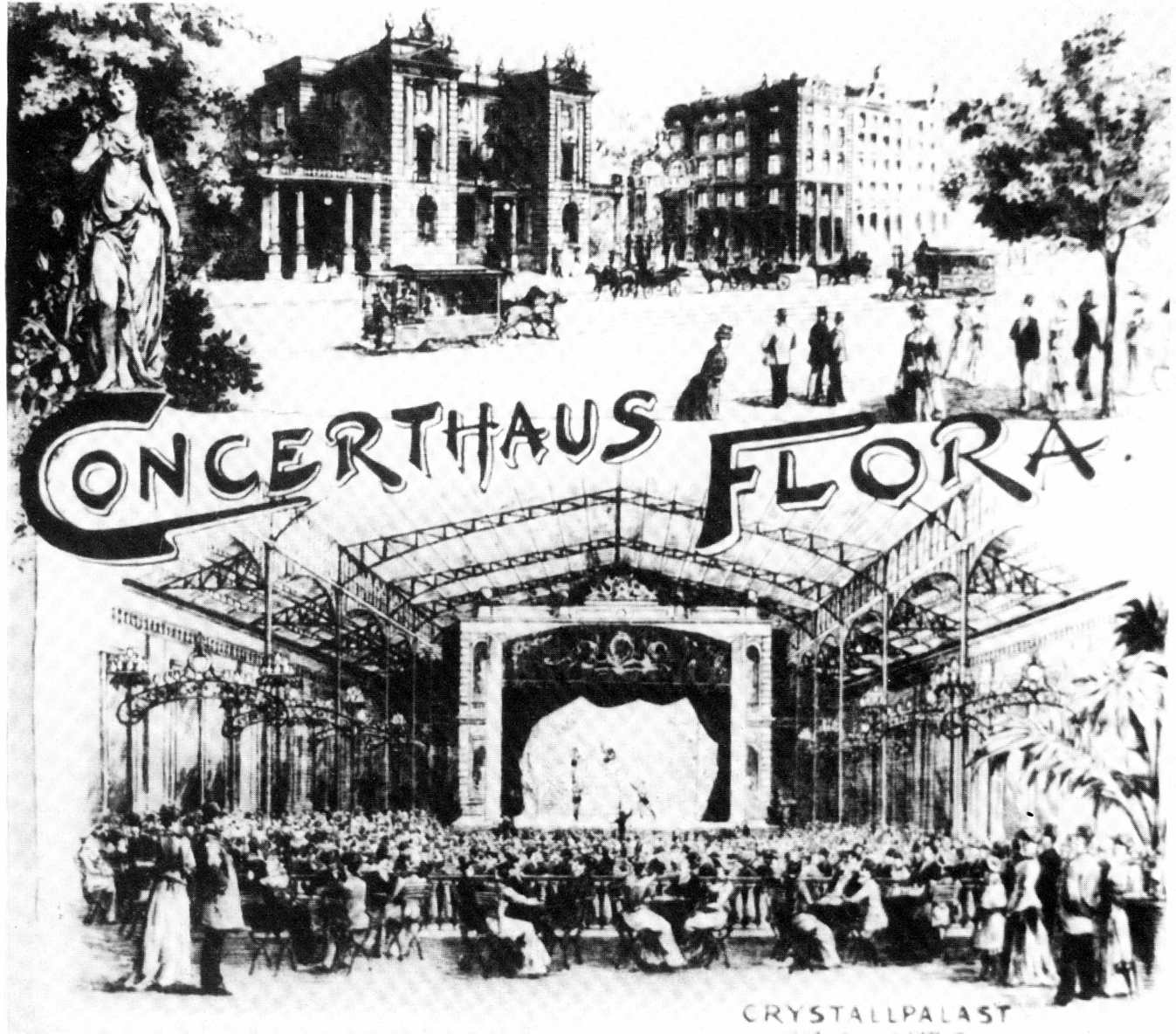 programmzettel des concerthaus flora hamburg schulterblatt mit crystallpalast